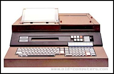 Снимок компьютера Olivetti P6060.